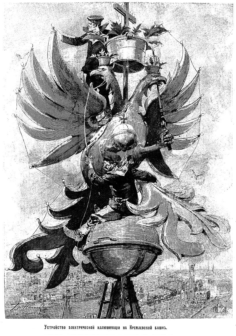 Устройство электрической иллюминации на Кремлёвской башне. Коронация. 1896